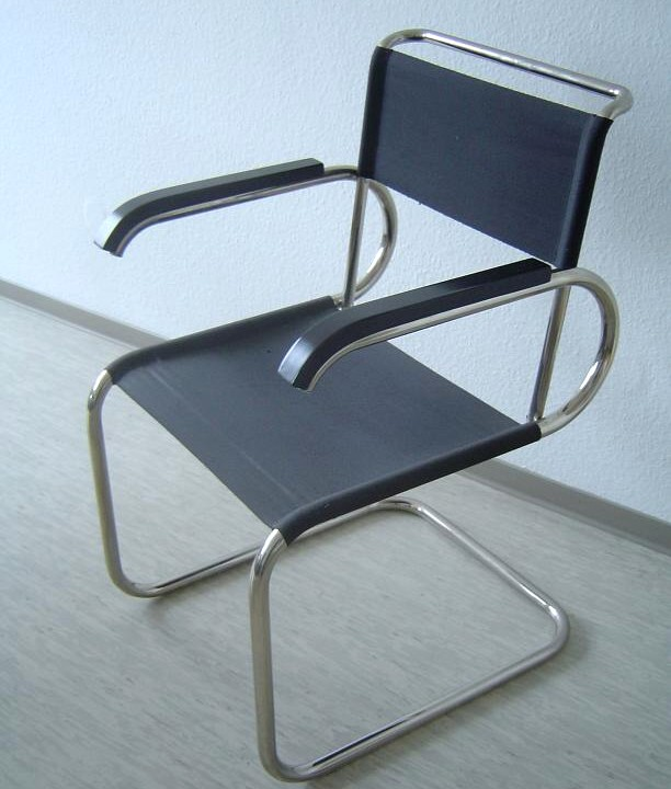 Freischwinger B55, Entwurfe Marcel Breuer, verchromtes Stahlrohr, Eisengarnbespannung, lackierte Holzarmlehnen)